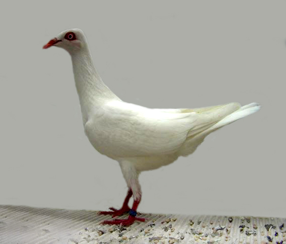 Stralshunder Highflier (white self)